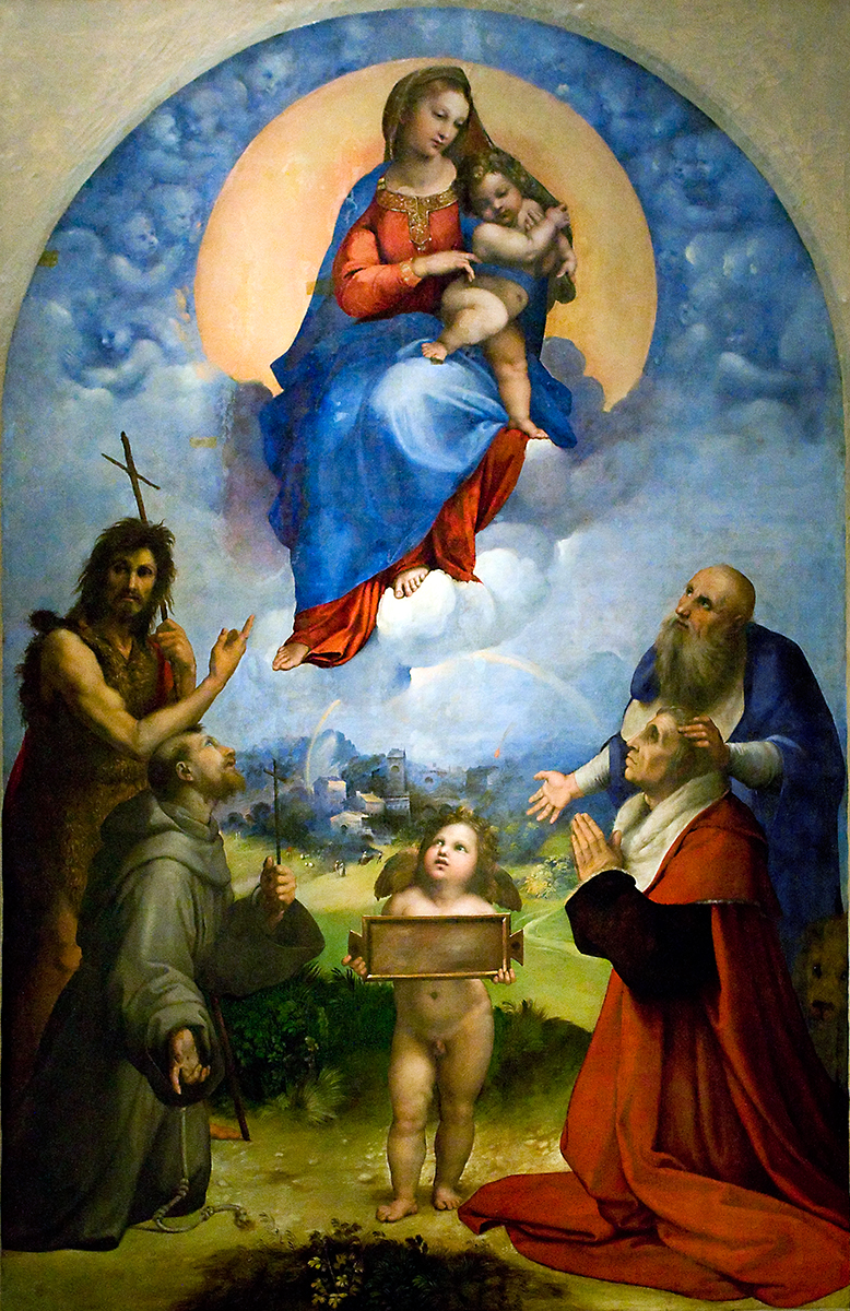 Madonna di Foligno - Raffaello Sanzio da Urbino